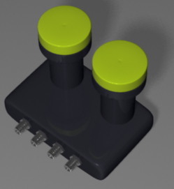 Są to dwa konwertery w jednej obudowie umieszczone obok siebie + wbudowany przełącznik DiSEqC. Konwerter ten zastępuje układ dwóch pojedynczych konwerterów zamontowanych w układzie zez (każdy konwerter odbiera sygnał z innego satelity).Konwerter ten stosuje się dla anten średnicy 80-90 cm , w Polsce dla satelitów HotBird i Astra. Konwerter ten posiada jedno wyjście przełączanie satelity oraz zakresów i polaryzacji jest sterowane przez odbiornik. Konwertery Monoblock mają kilka odmian Monoblock TWIN . Obsługuje dwa dekodery dając im niezależny sygnał z dwóch satelitów. Konwerter ten podobnie jak twin ma dwa wyjścia. Monoblock QUAD . Obsługuje cztery dekodery dając im niezależny sygnał z dwóch satelitów. Konwerter ten podobnie jak QUAD ma cztery wyjścia.